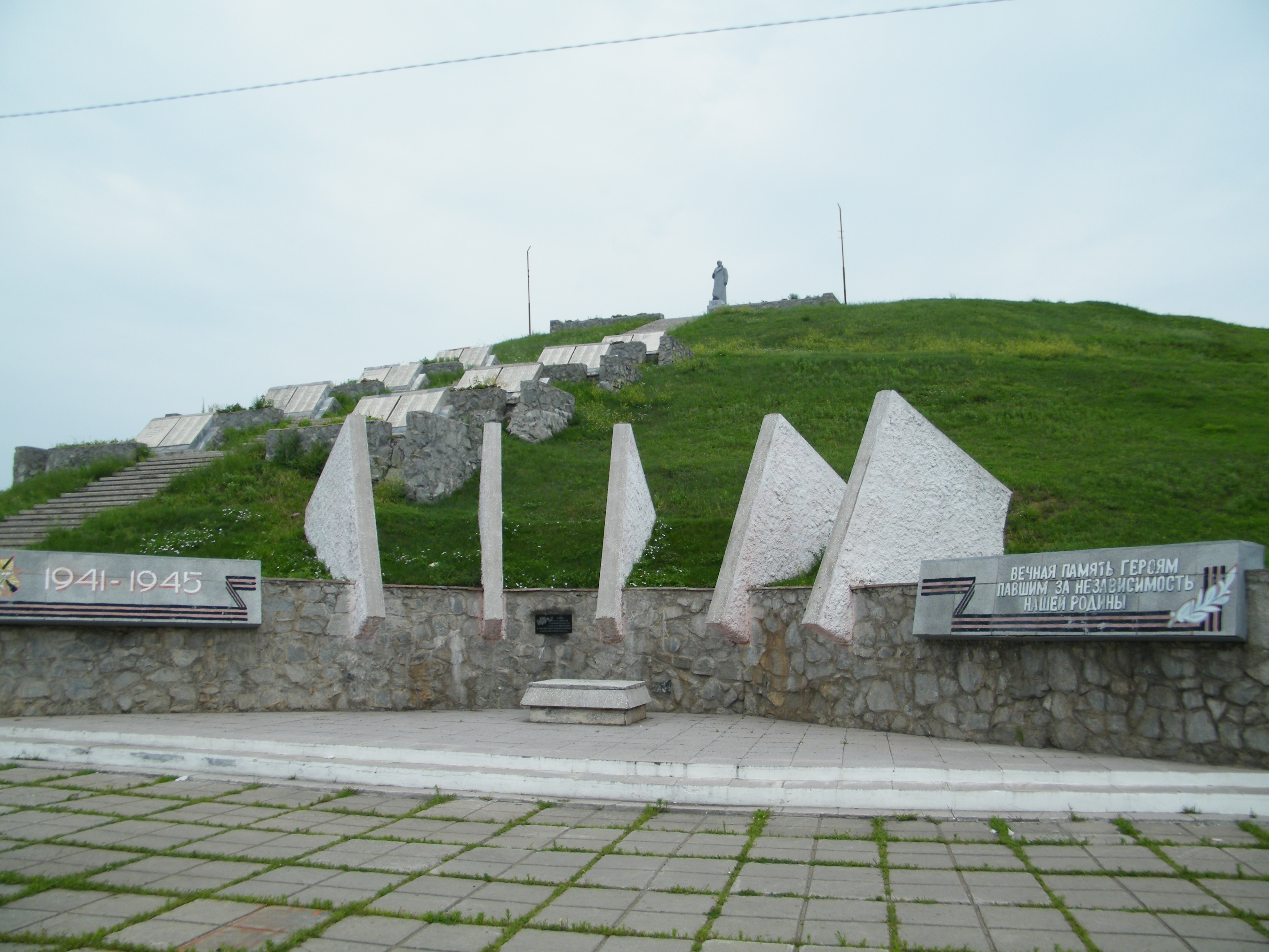 Бикин, Мемориал Победы